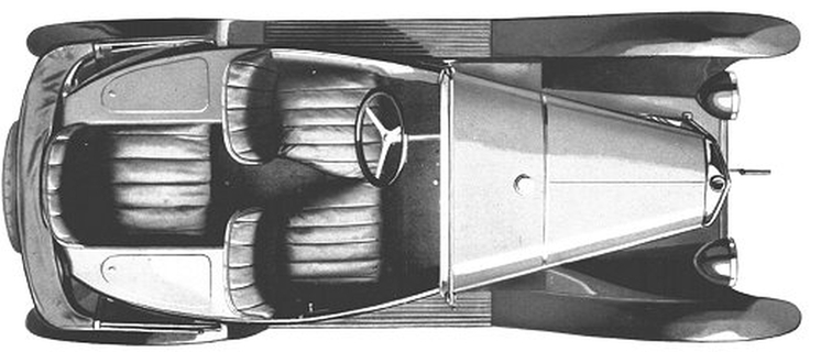 Vue de dessus de la Citroen 5HP Torpedo T3-2 montrant la disposition des trois sieges